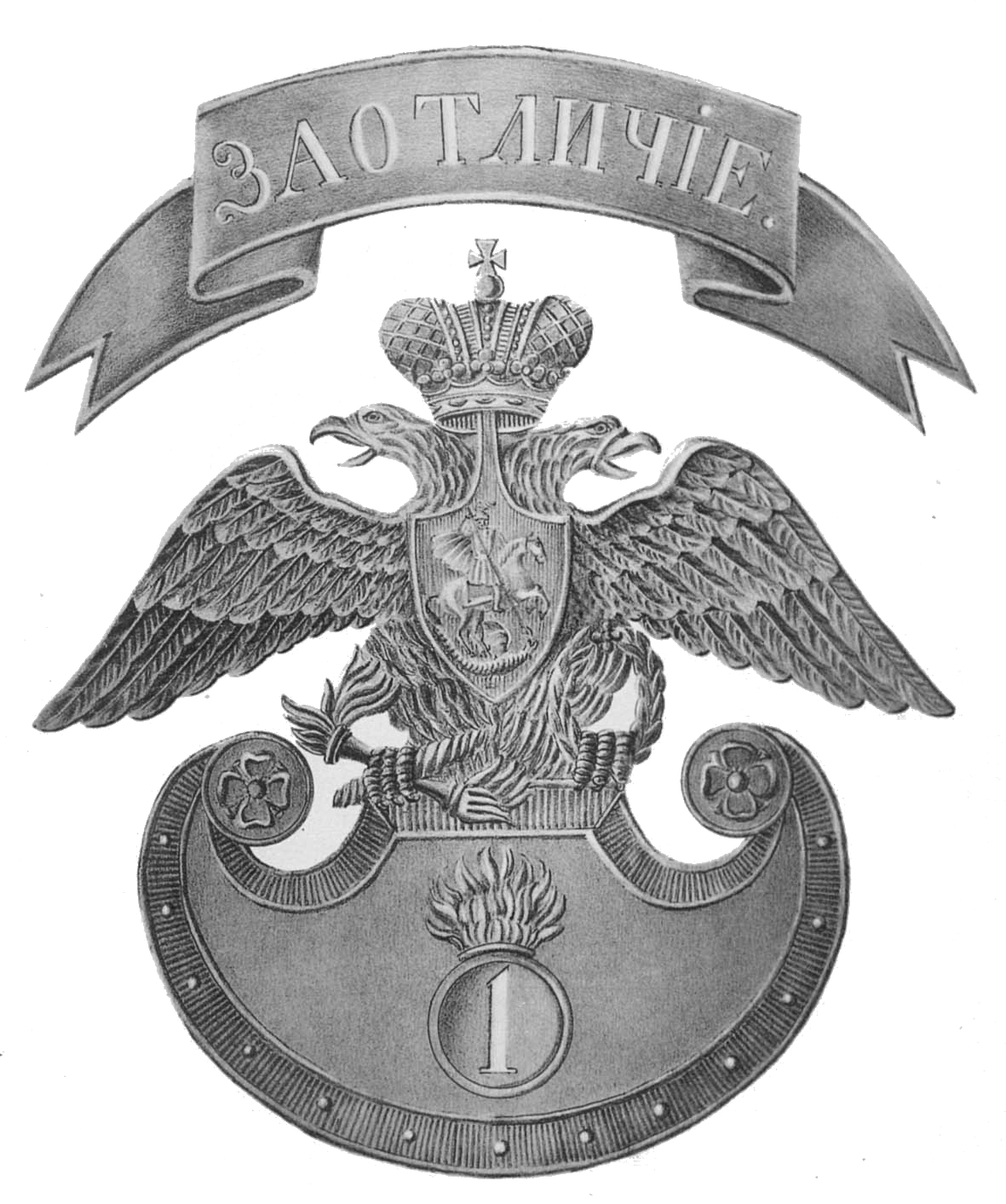 Киверной Герб Гренадерского полка и знак отличия, утержденные 24 апреля 1828 года.